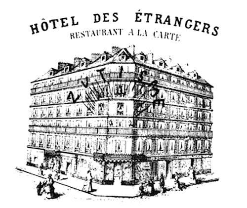 Vignette de l'Hôtel des Étrangers figurant sur la couverture de l'Album zutique. Fac-similé édité par Pascal Pia en 1962 (J.J.Pauvert éditeur). L'image publicitaire a été surchargée Zutisme et collé dans l'album.